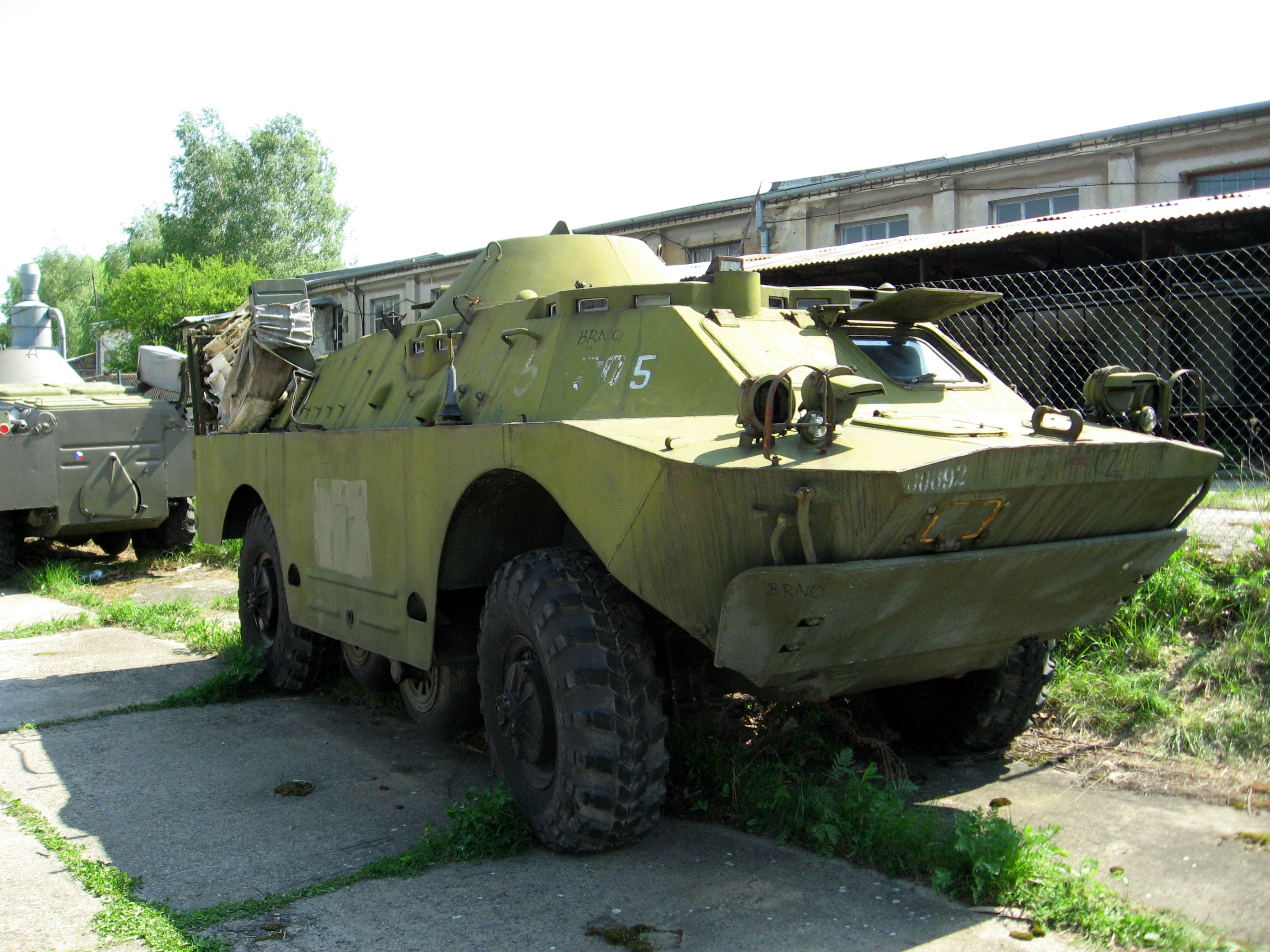 Den otevřených dveří areálu MHD Řečkovice Technického muzea v Brně